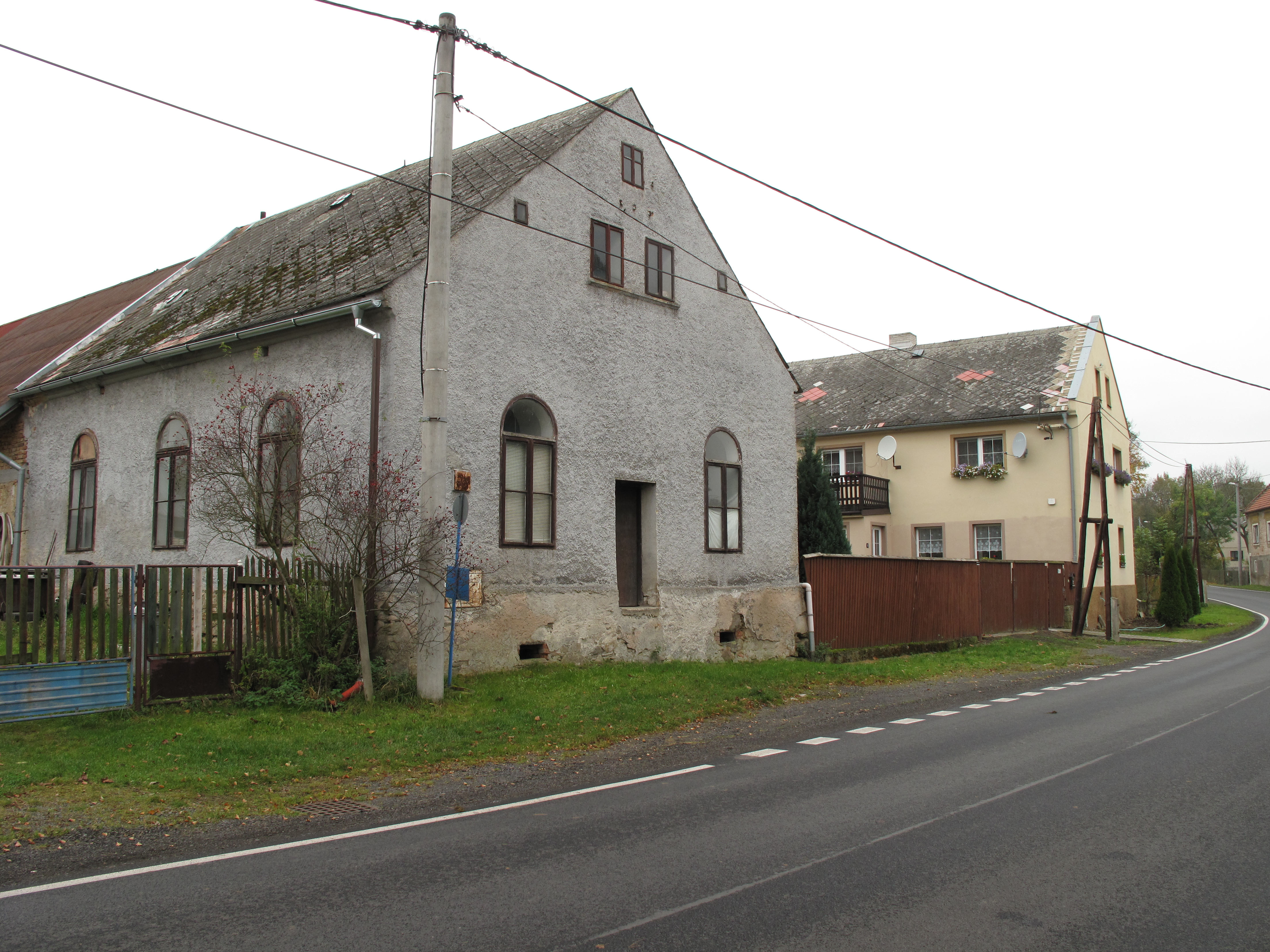 Šedý dům ve Veselově. Okres Karlovy Vary, Česká republika.